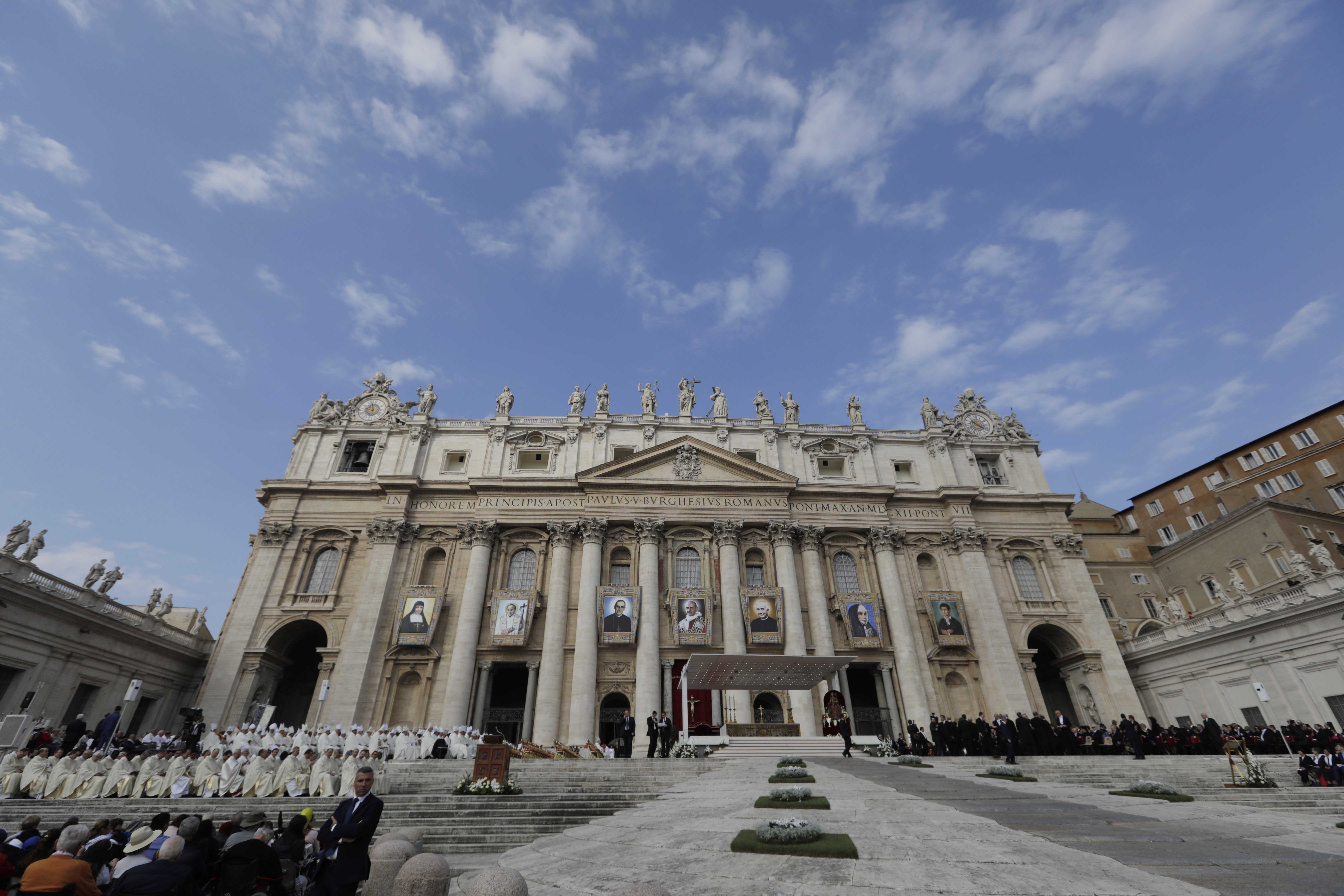 Ceremonia de Canonización de Monseñor Romero.